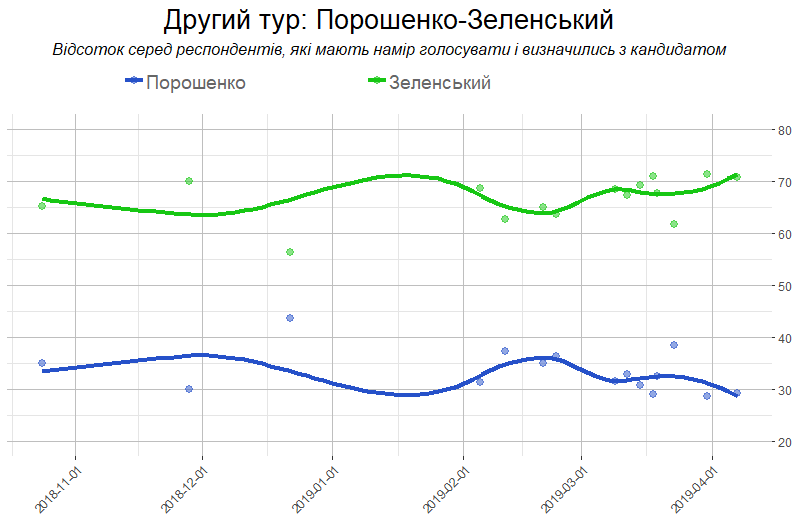 Рейтинги Порошенко та Зеленсткого в другому турі виборів 2019 року на основі даних авторитетних соціологічних компаний КМІС, Рейтинг, Центр Разумкова, Соціальний моніторинг, УІСД, СОЦИС, GfK. Дані для графіку містяться в статті вікіпедії "Вибори Президента України 2019 (соціологічні опитування)